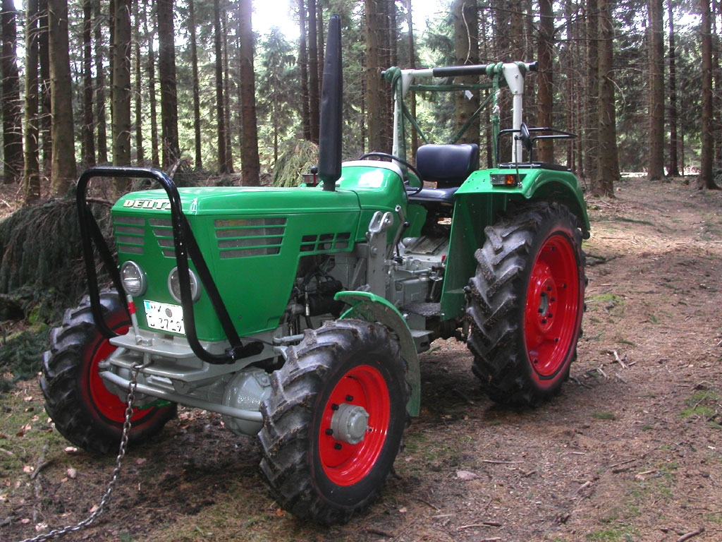 Deutz D5006 im Forsteinsatz